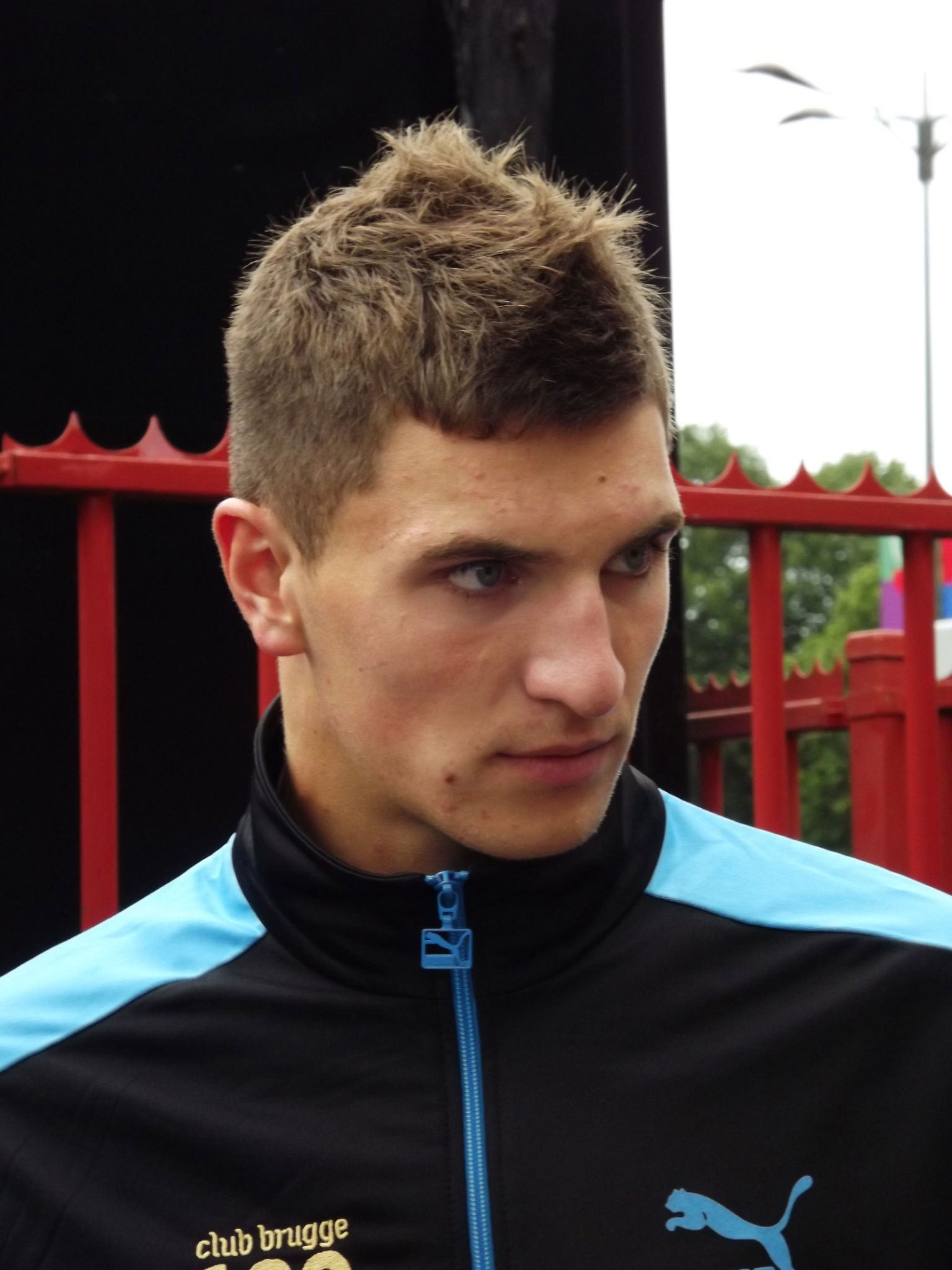 Thomas Meunier (Club Brugge)